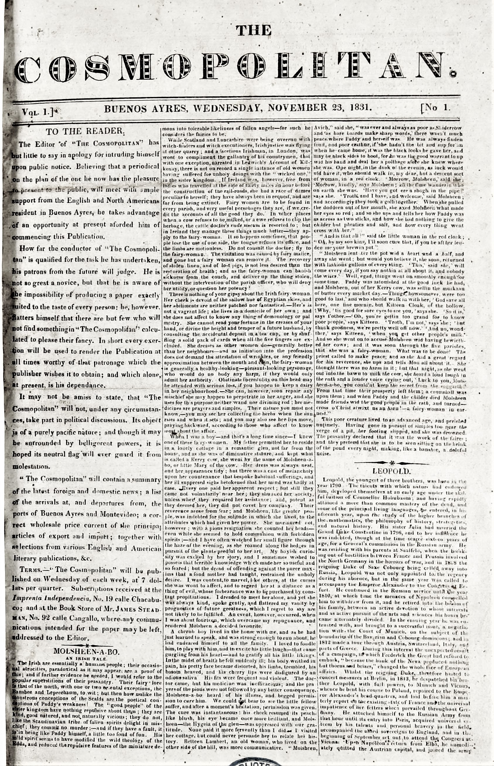 The Cosmopolitan, diario inglés publicado en Buenos Aires